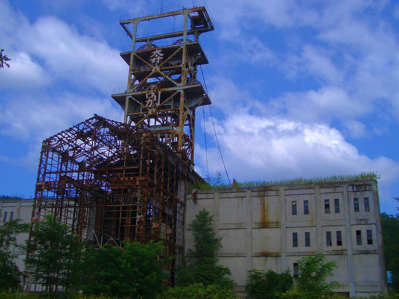 Mikasa city, Hokkaido, Japan